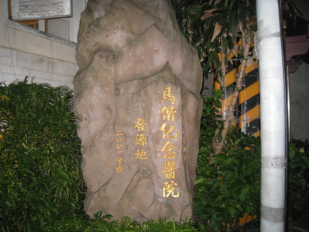 馬偕紀念醫院發源地刻石。